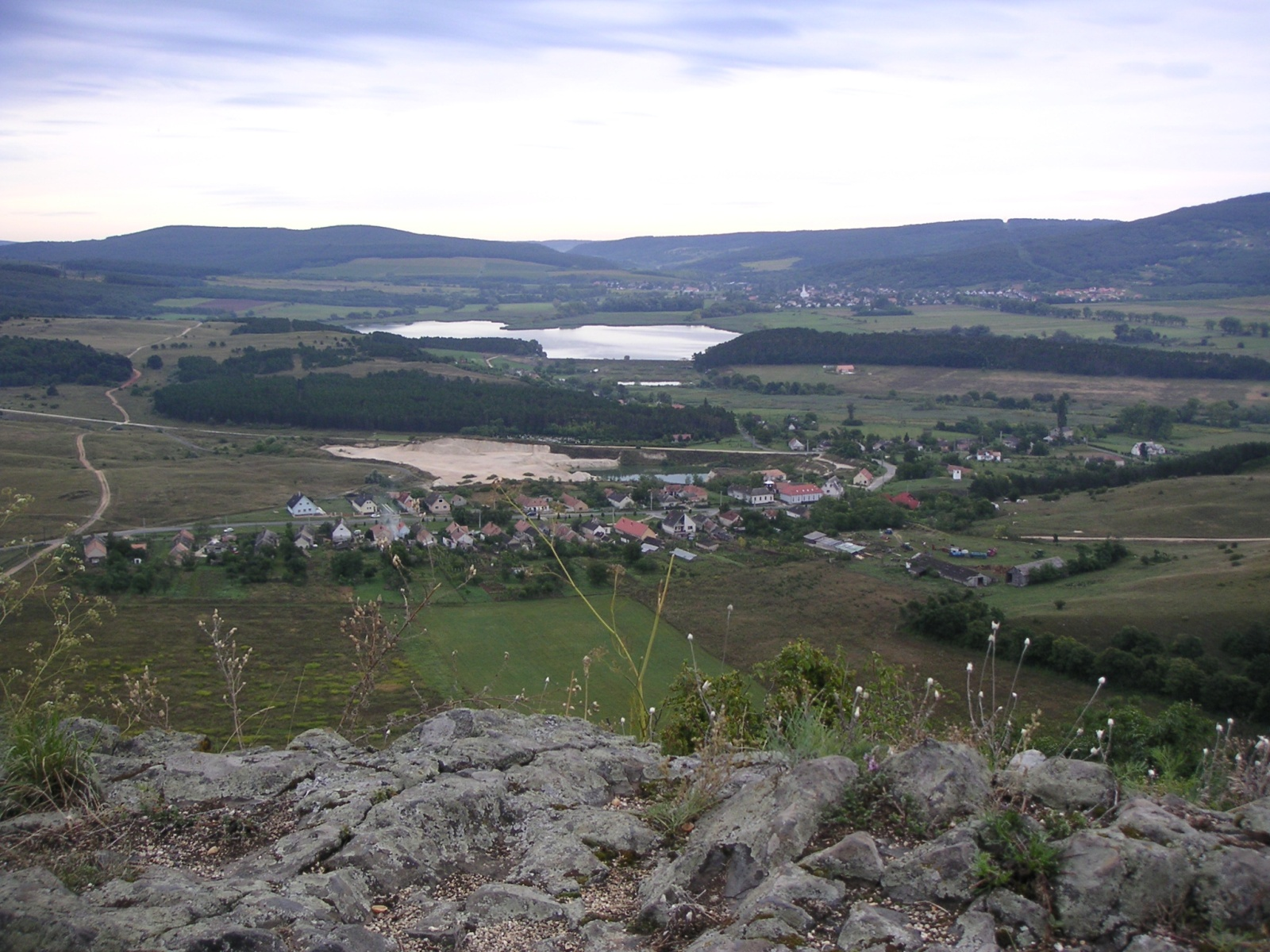 Hegyesd látképe a 281m magas Hegyesd hegyről. A képet magam (User:Kertiati) készítettem 2006.08.21-én